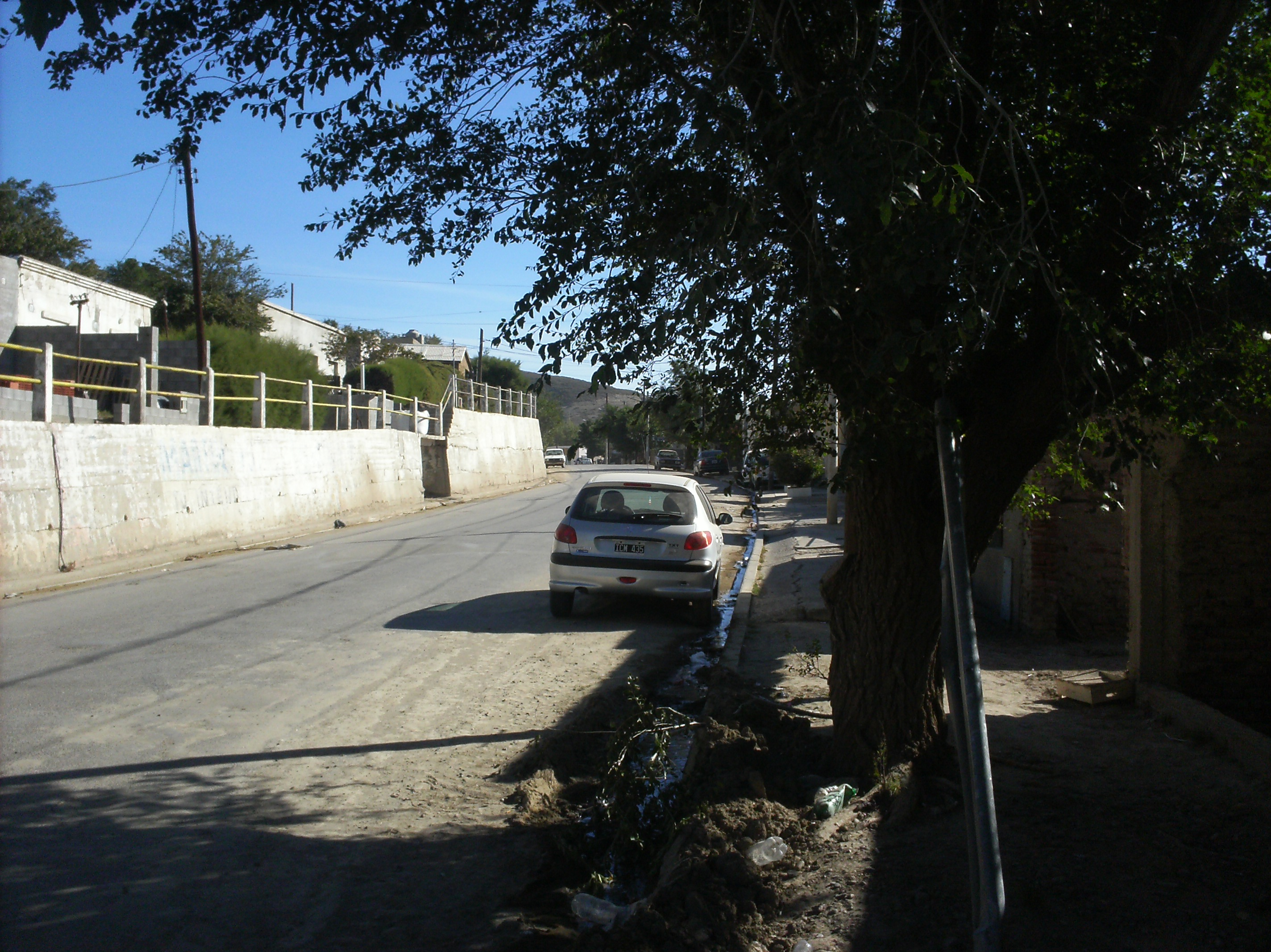 la calle principal delbarrio la prida